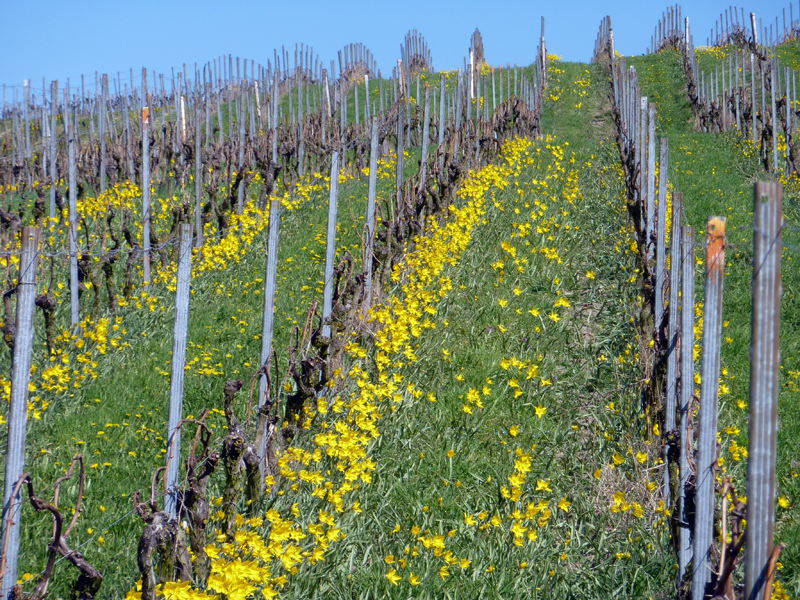 Wild-Tulpen "Tulipa sylvestris" (ND-7331-441) in den Weinbergen von Gau-Odernheim. Wuchsort der Wildtulpe am Lieberg östlich von Gau-Odernheim, Gewann Am Lieberg. Flächenhaftes Naturdenkmal, ca. 6,1 ha; größtes Vorkommen von Tulipa sylvestris nördlich der Alpen.